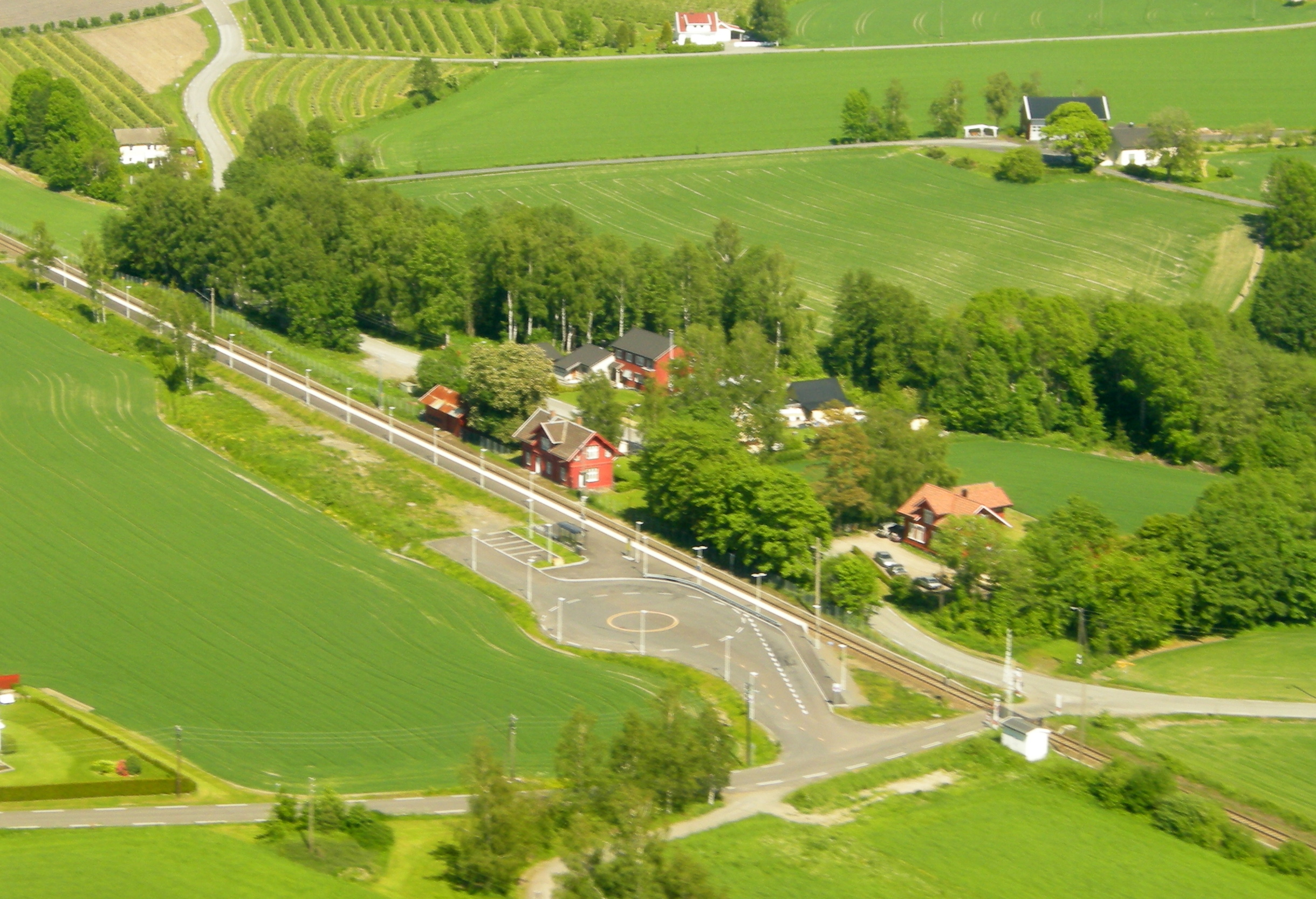 Råstad stasjon, Norway